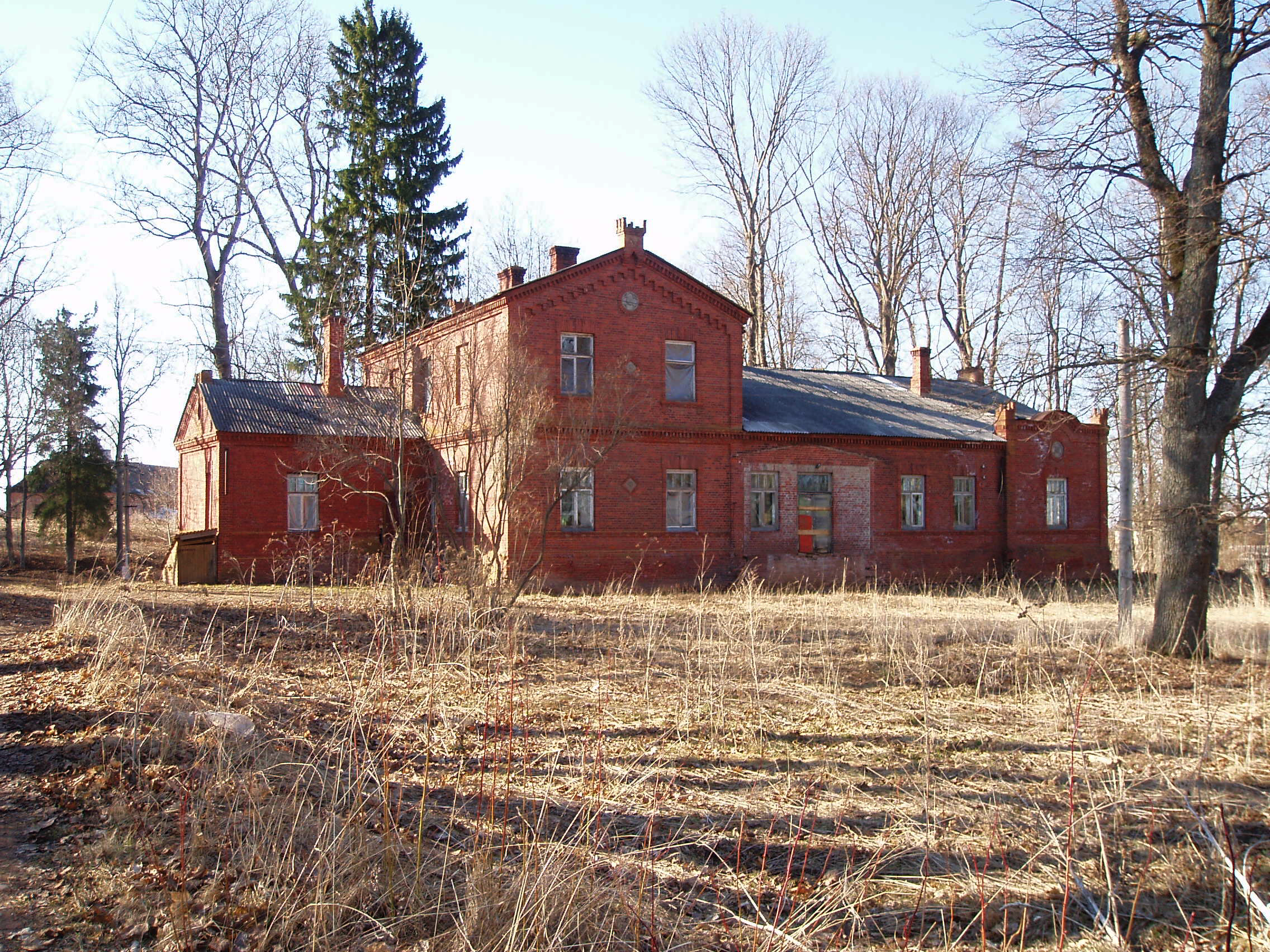 Kurista mõisa peahoone 2006. aastal